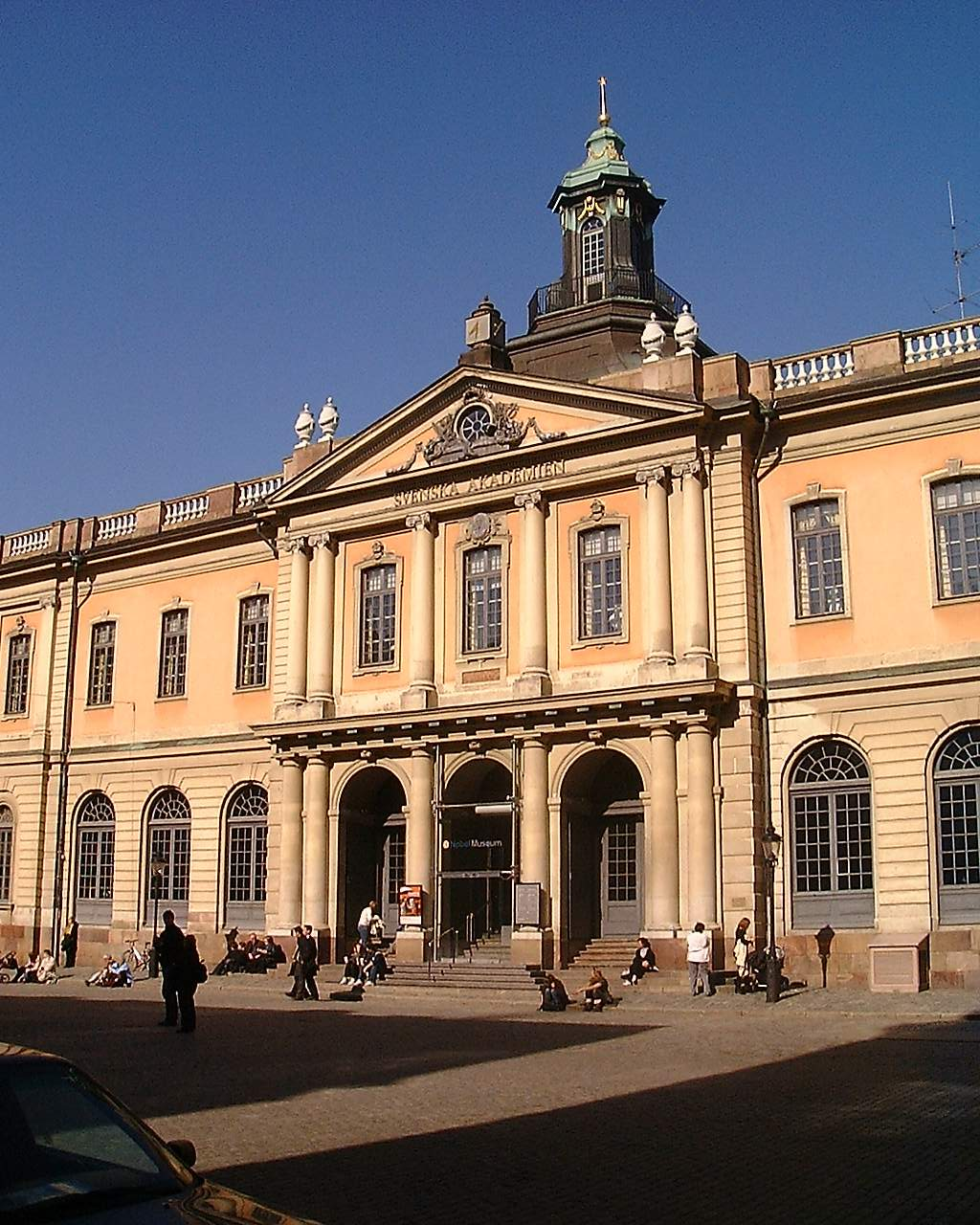 Façade of Stockholm Stock Exchange Building, Gamla stan, Stockholm.